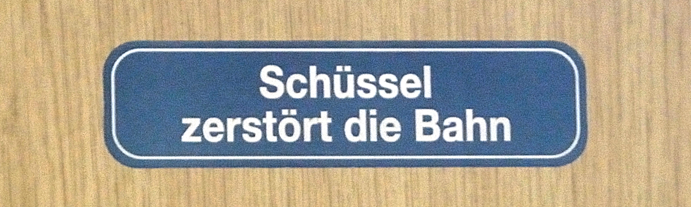 Die Haltestelle Johnsbach der Rudolfsbahn im Ennstal, bei der Abzweigung des Johnsbachtals vom Ennstal. Bis 2014 Gemeinde Johnsbach, ab 2015 Gemeinde Admont. In Dienstbereich ein Aufkleber gegen die von Wolfgang Schüssel geführte Bundesregierung mit dem Text Schüssel zerstört die Bahn.